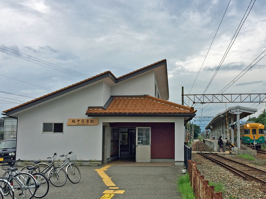 富山地方鉄道本線 越中荏原駅